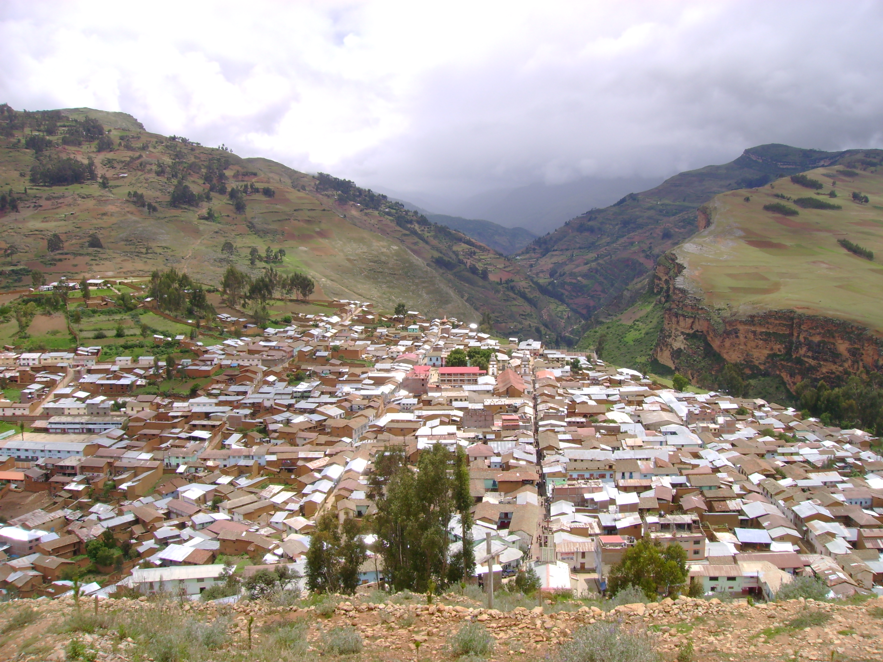 Llata al fondo Rondos